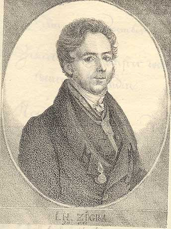 Porträt-Lithographie des Gärtners Johann Hermann Zigra in Riga (1823).